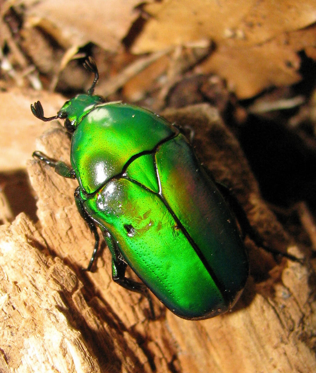 Chlorocales africana africana